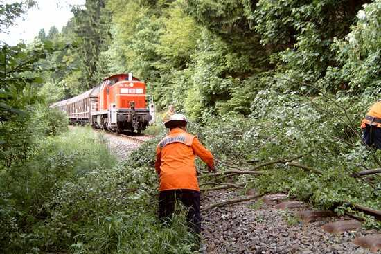 Beseitigung eines Baumes (Windwurf) von Bahngleisen, Brilon, Nordrhein-Westfalen, Germany